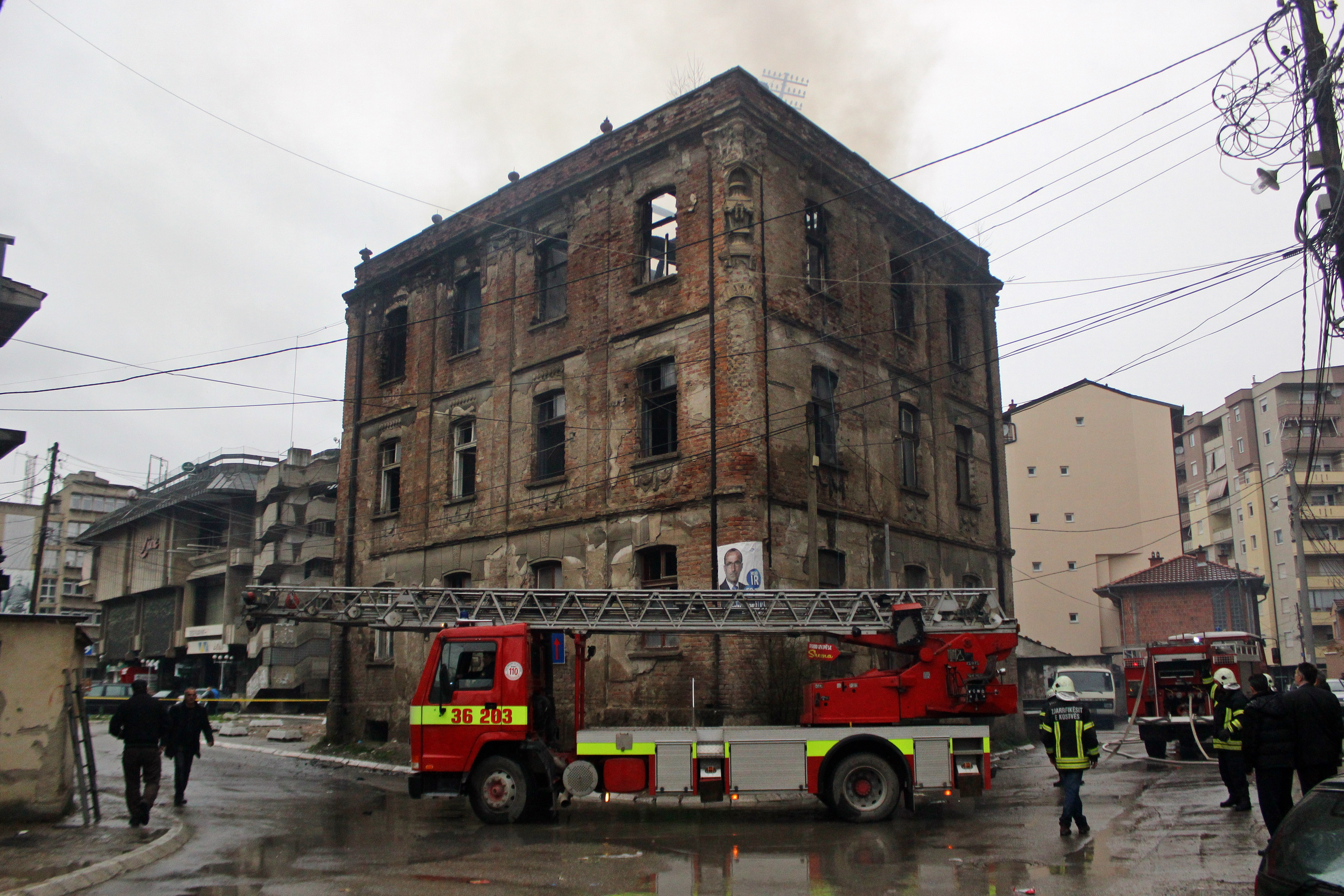 Shtëpi banimi Xhafer Deva (1930)